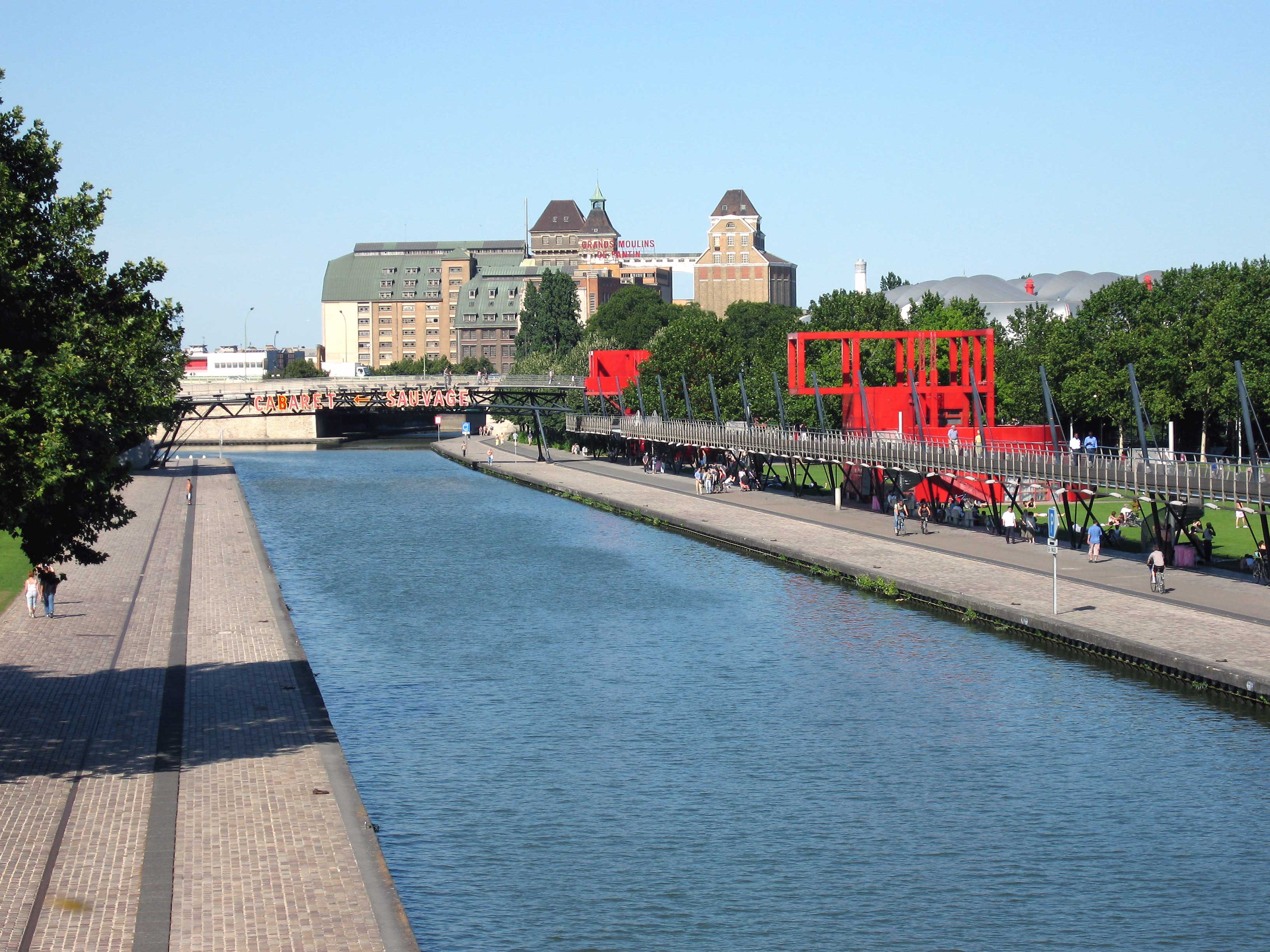 Description : Parc de la Villette, le canal de l'Ourcq, au fond les moulins de Pantin (en cours de transformation en bureau) et à droite la bulle de la salle de spectacle du Zenith Lieu : Paris, France Date : 2006 Author : Pline photo ou réalisation (schéma) personnelle